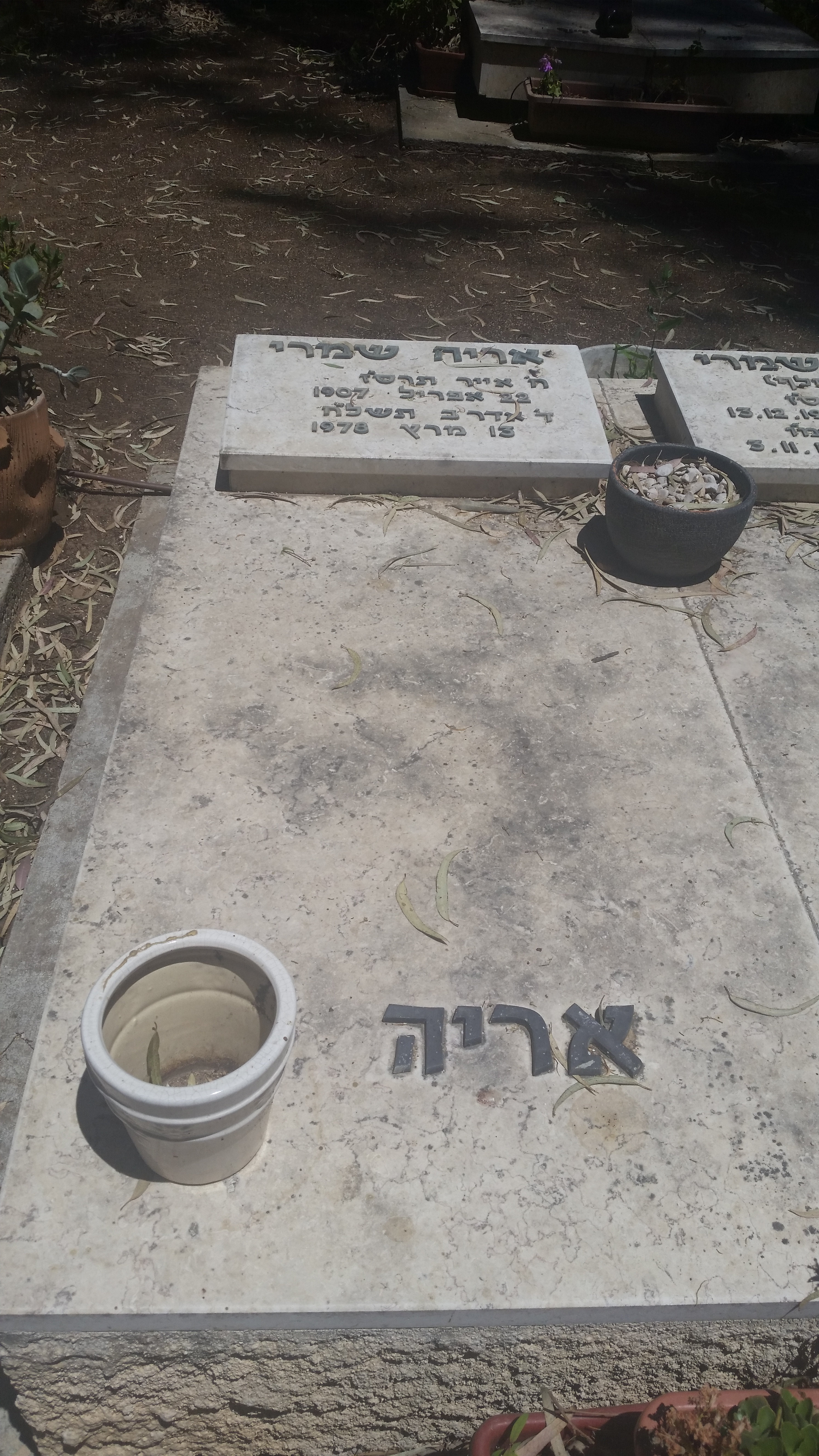 קברו של אריה שמרי בבית הקברות של קיבוץ עין שמר